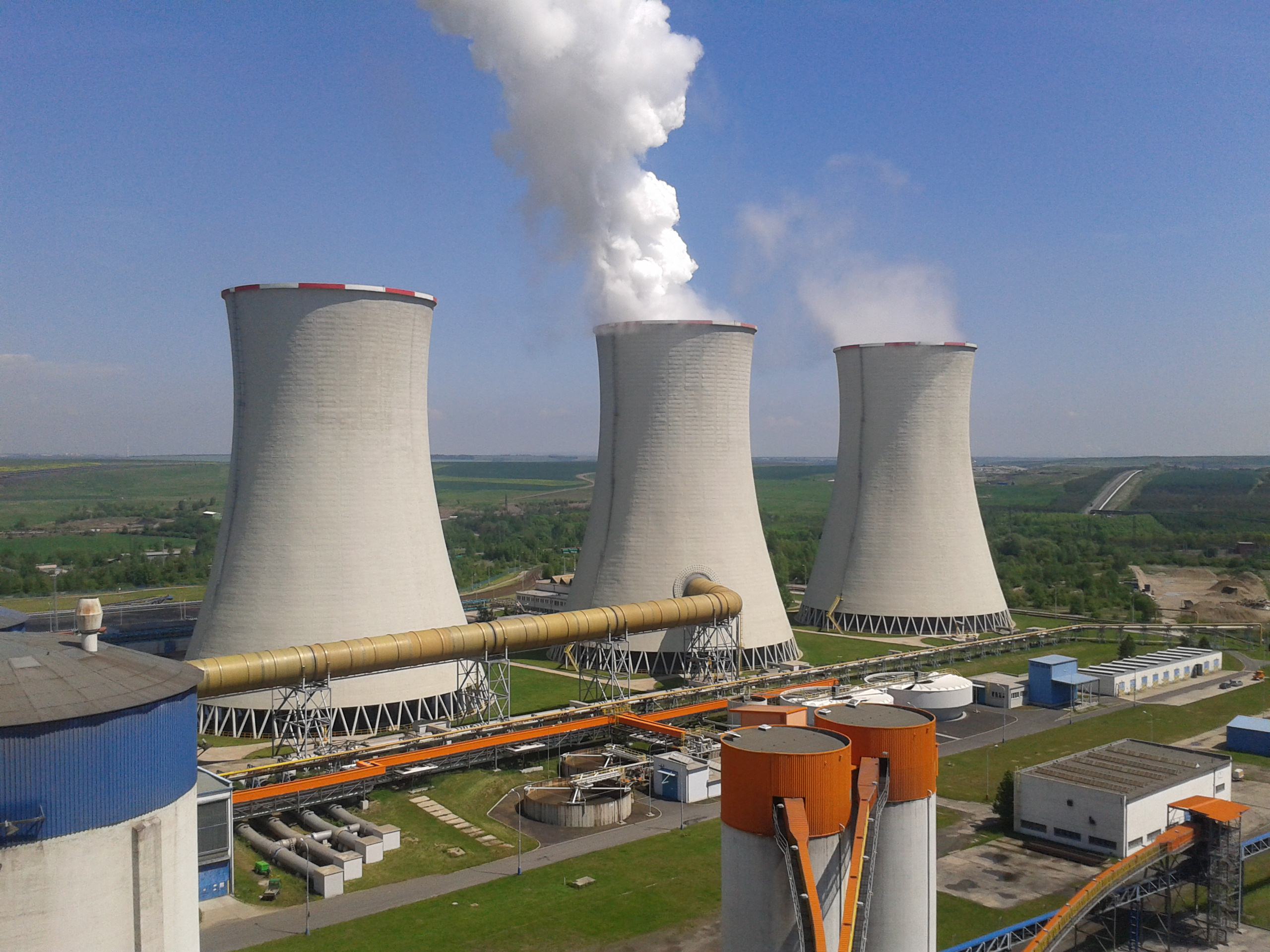 Pohled na chladící věže elektrárny Tušimice II ze střechy její kotelny